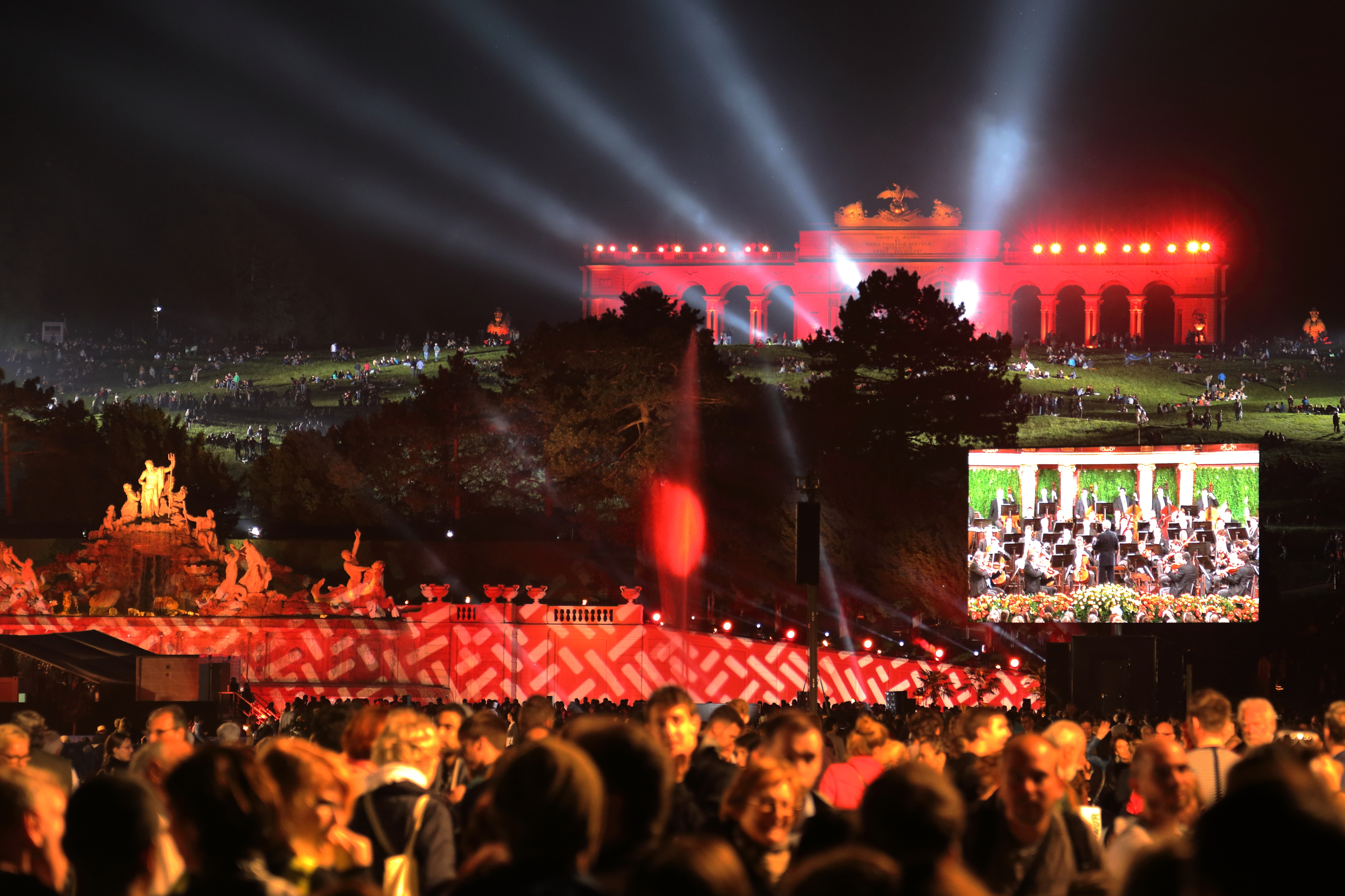 Sommernachtskonzert 2016 der Wiener Philharmoniker am 26. Mai 2016 im Schönbrunner Schloßpark vor dem Neptunbrunnen und der Gloriette in Wien. Dirigent war Semyon Bychkov und es wurden Werke von Georges Bizet, Hector Berlioz, Francis Poulenc sowie Maurice Ravel aufgeführt. Am Klavier spielten die Geschwister Katia und Marielle Labèque. Das Konzert wurde von über 100.000 Menschen besucht und von 83 TV-Stationen in 82 Ländern übertragen. Weiters fanden Live-Public-Viewings in den Städten London, Madrid, Monza und Bukarest statt.